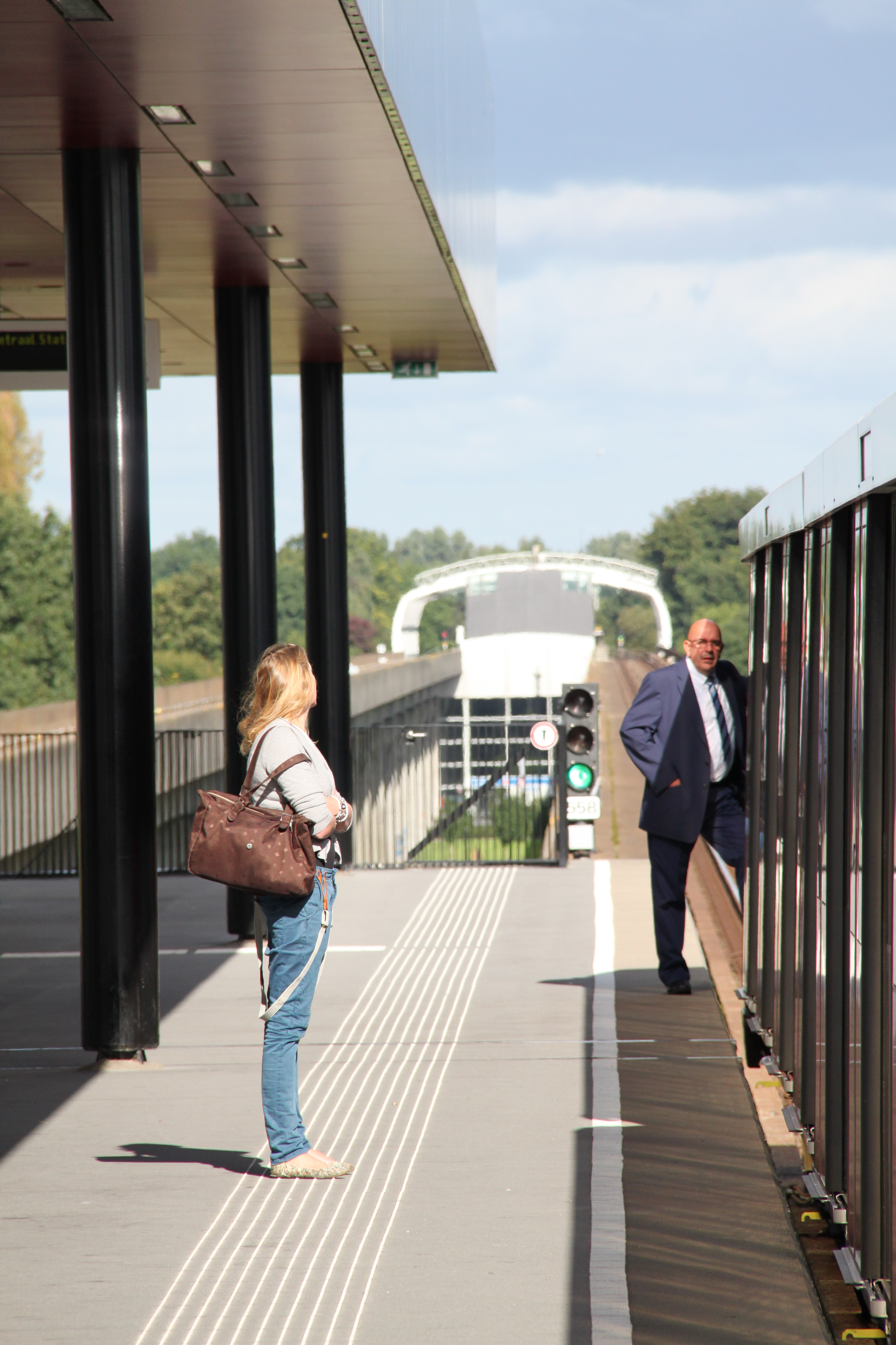 Het teststel type M5 van de metro van Amsterdam tijdens de perspresentatie in september 2012.